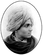 Swami Swarupananda, der direkte klösterliche Schüler von Swami Vivekananda